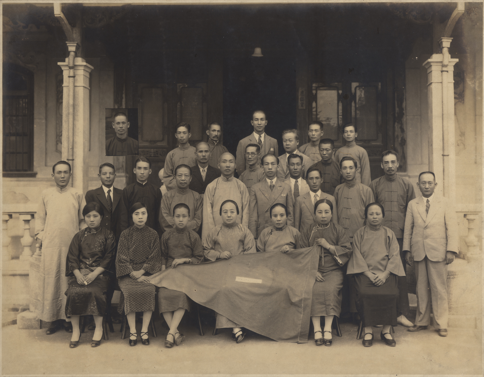 霧峰一新會會員與其會旗合影於會館前；前排右二呂裕（林其賢妻）、右三楊桂鶯（林春懷妻）、右四楊水心（林獻堂妻）、右五林吳帖（林資彬妻）、林阿華夫人、楊素英，中排立左一林阿華、左三林根生、左四林瑞騰、左五林獻堂、左六林攀龍、左十林其賢，後立中央最高者林猶龍，其前莊太岳，左上角林水來。 (照片由郭双富提供)